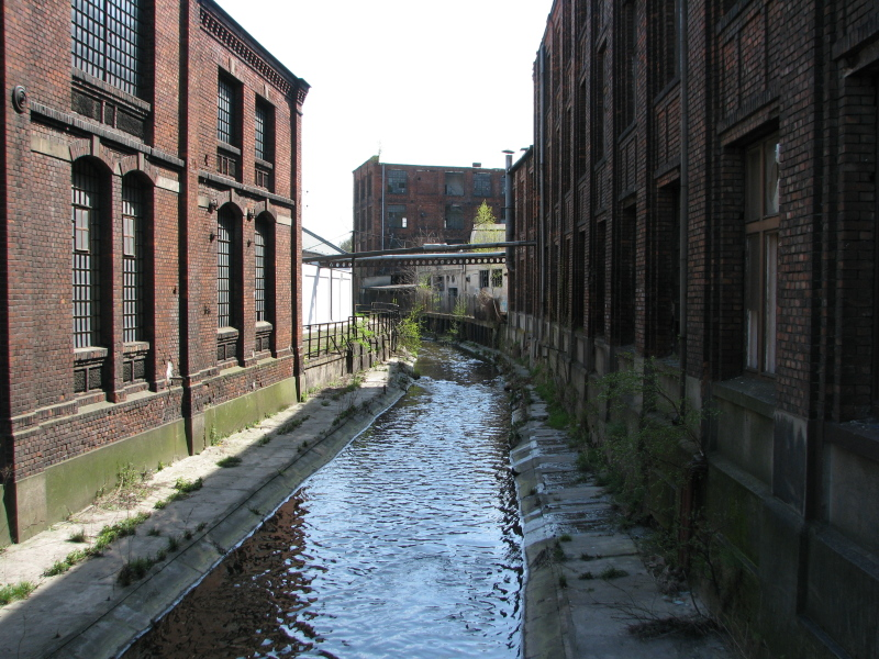 Dobrzynka płynąca poprzez dawne obiekty fabryczne w Pabianicach.